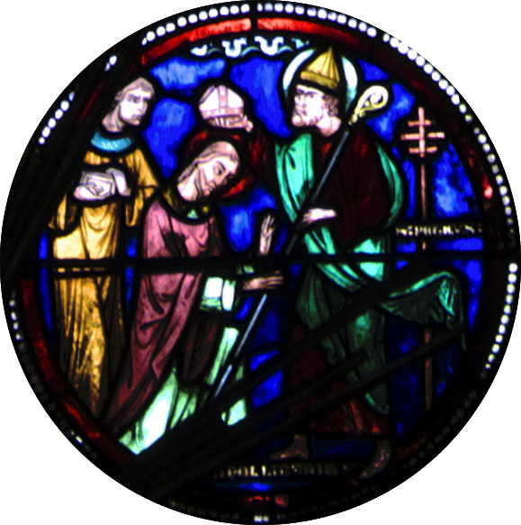 Kathedrale Saint-Pierre-et-Saint-Paul in Troyes im Département Aube (Champagne-Ardenne/Frankreich), Bleiglasfenster im Chor (baie 22) aus dem 13. Jahrhundert, im 19. Jahrhundert restauriert und ergänzt; Darstellung: Szenen aus dem Leben des hl. Apollinaris